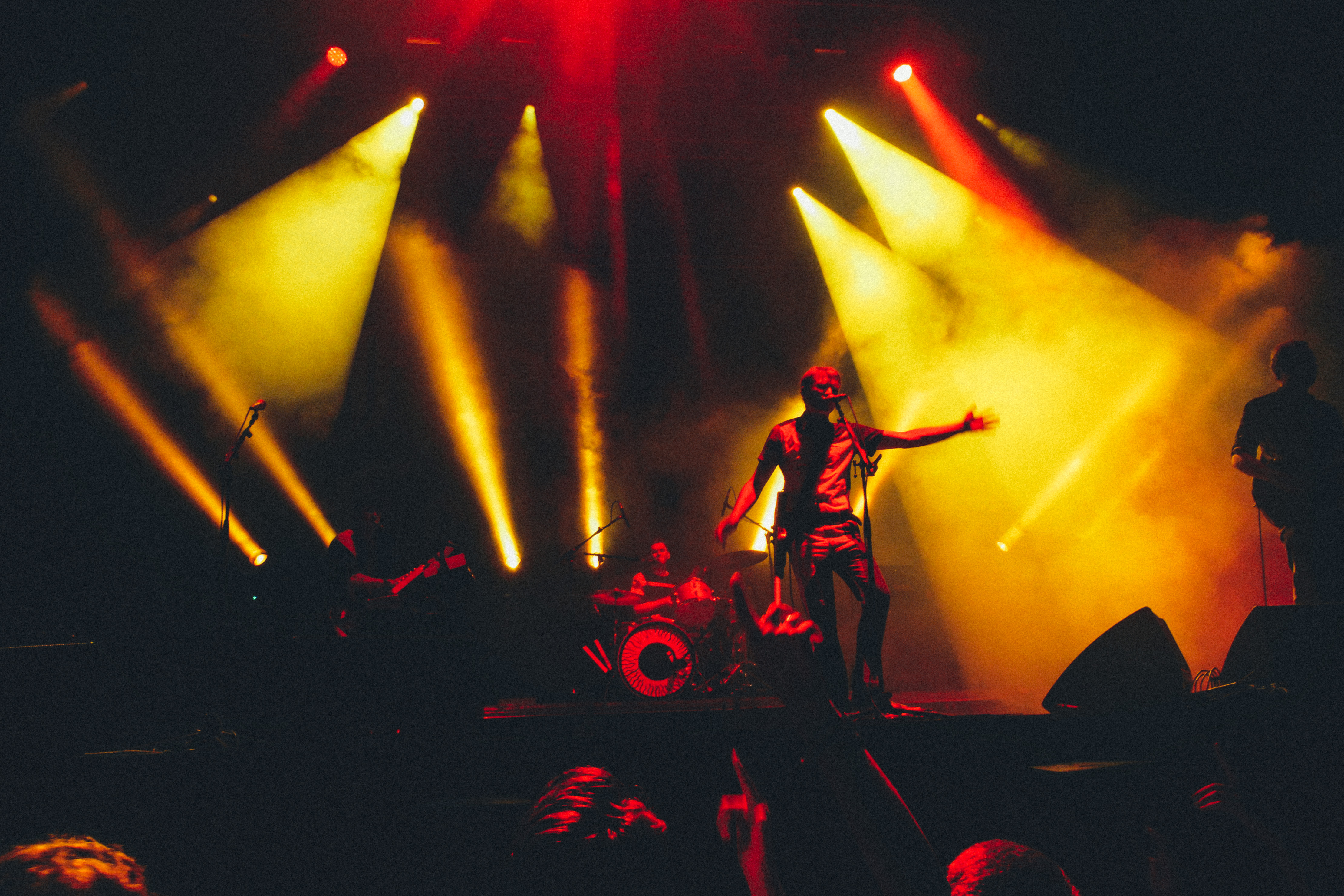 Concierto Franz Ferdinand 101 Sun Festival 2014, Málaga, España.